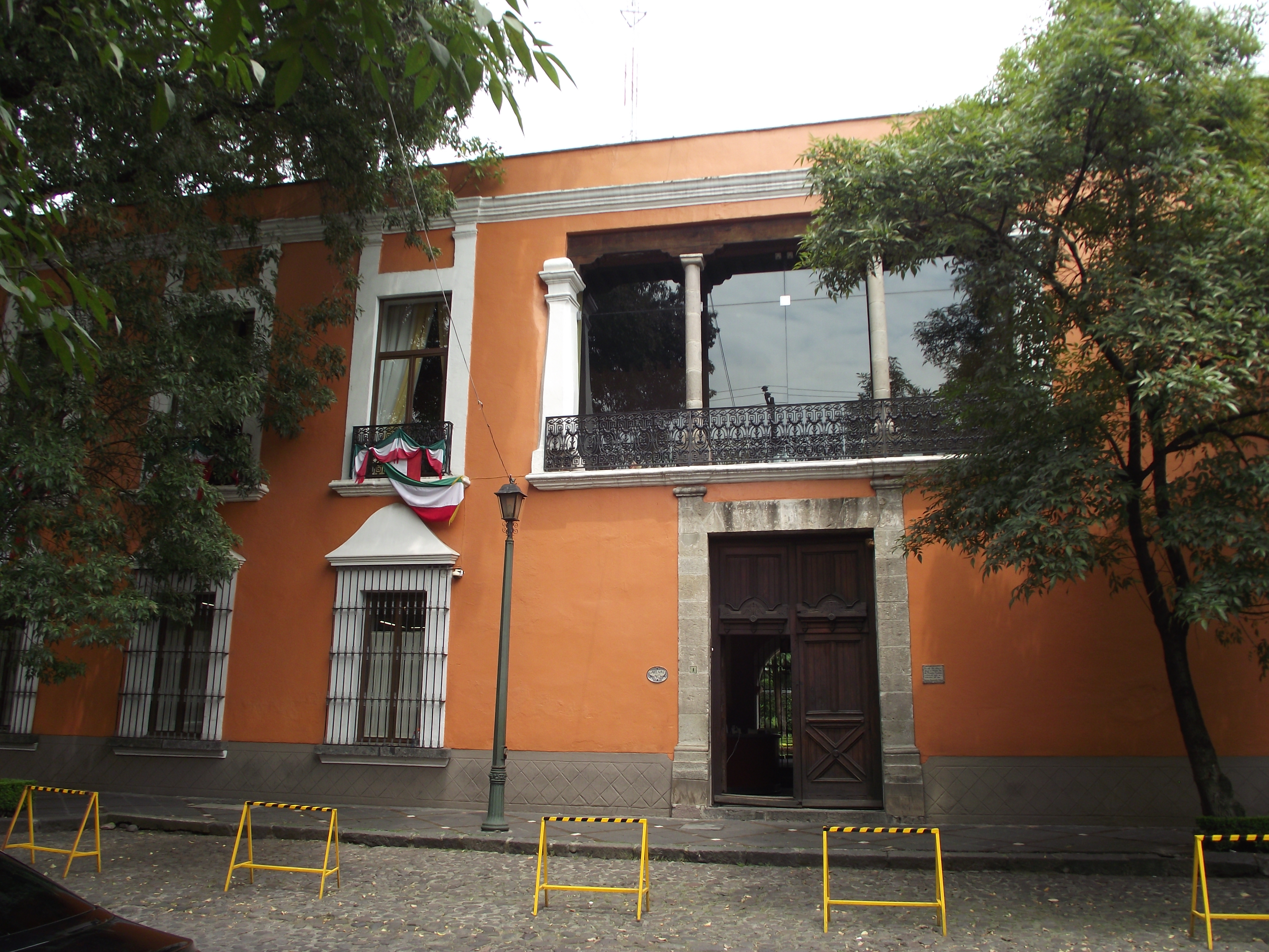 Ex Hacienda Guadalupe Chimalistac.